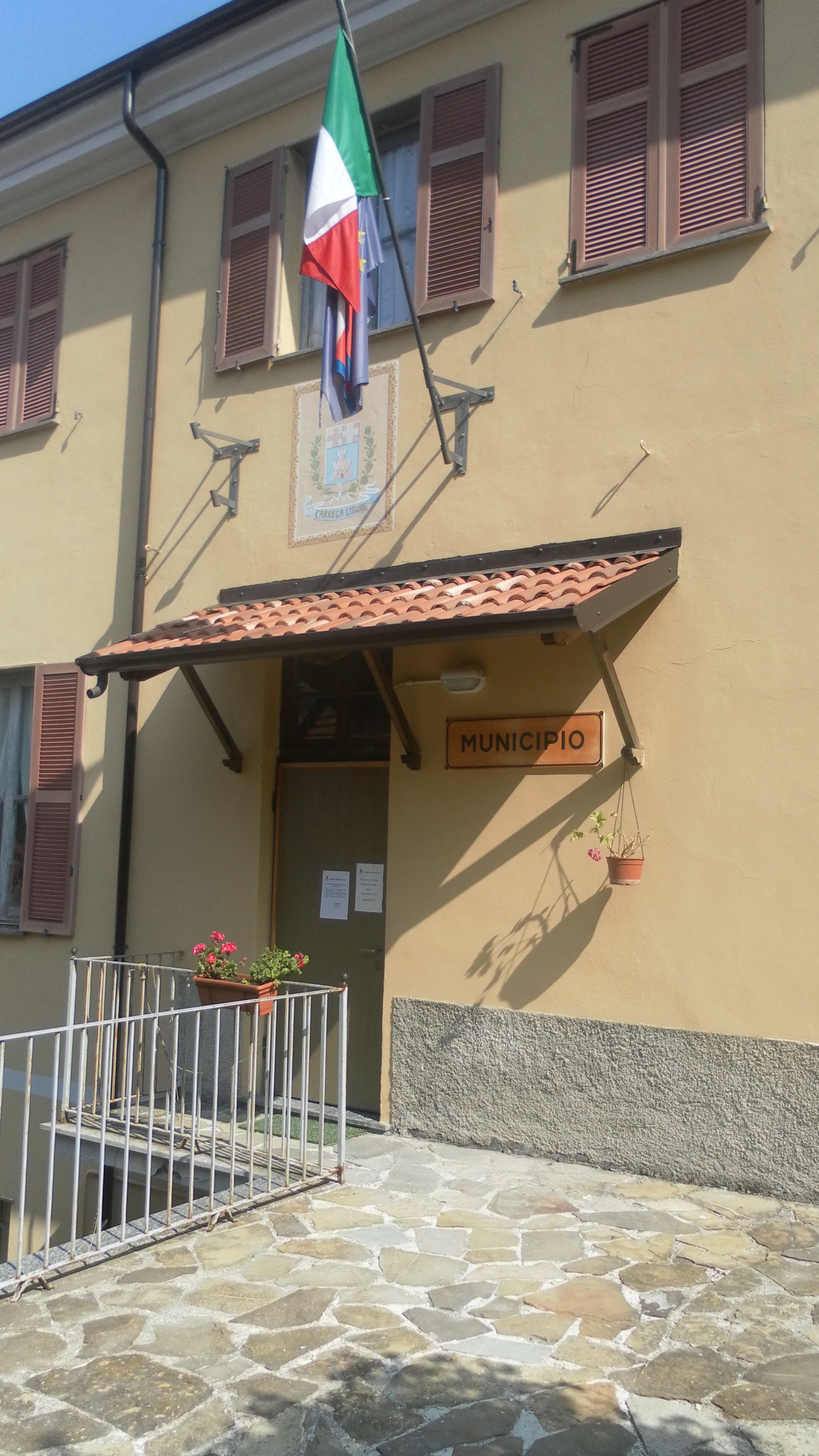 Municipio di Carrega Ligure (AL)